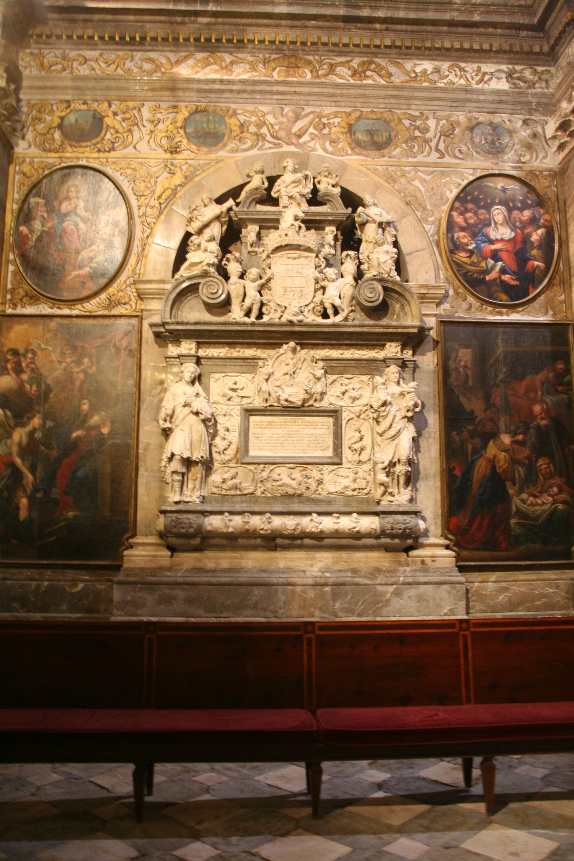 Sepulcre de Diego Girón de Rebolledo situat a la Catedral de Tarragona.